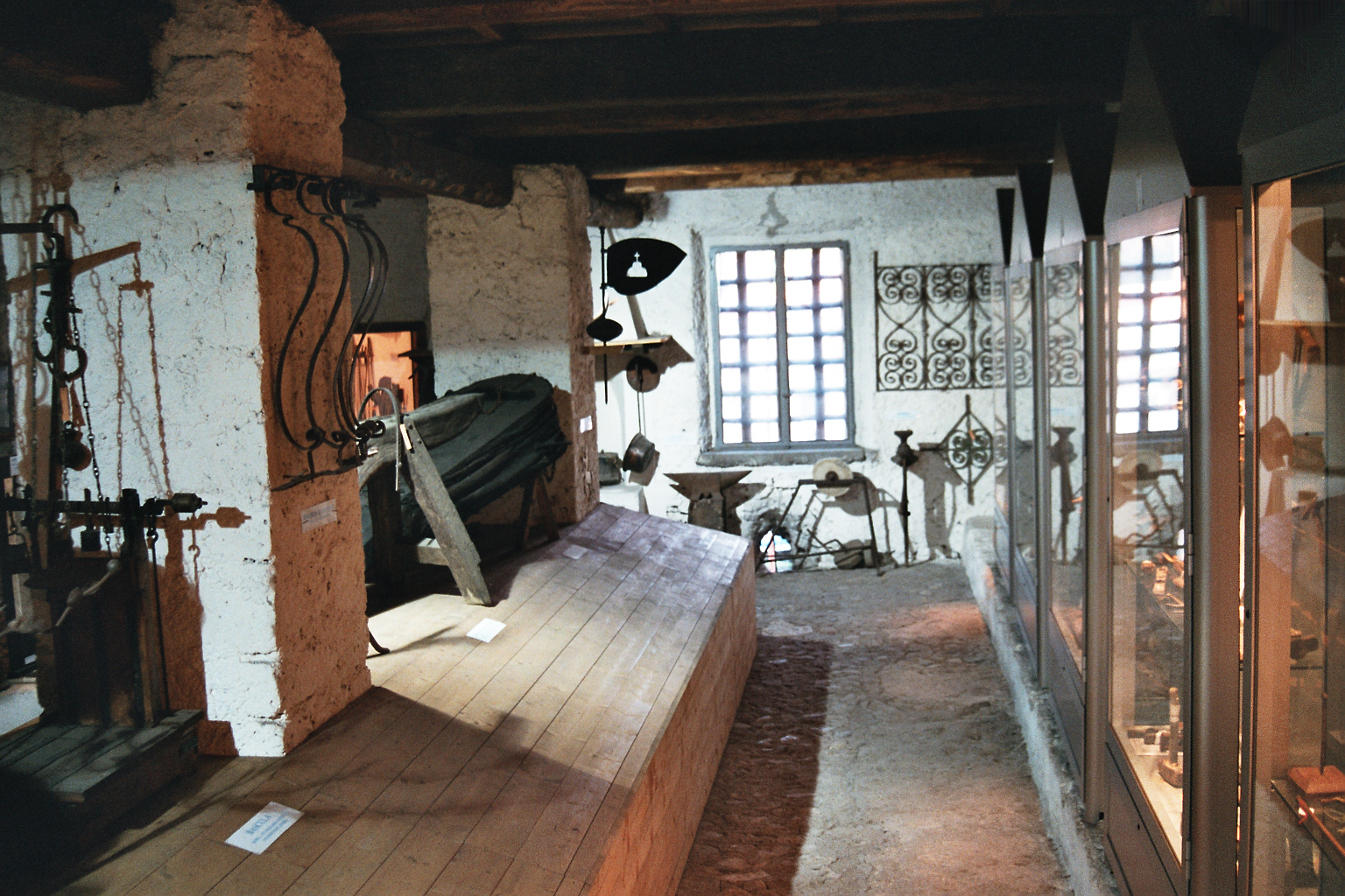 Vetralla, Museo della Città e del Territorio, sezione ferro